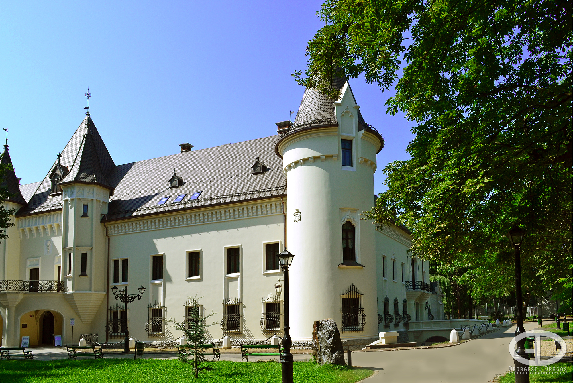 Vedere de ansamblu 01